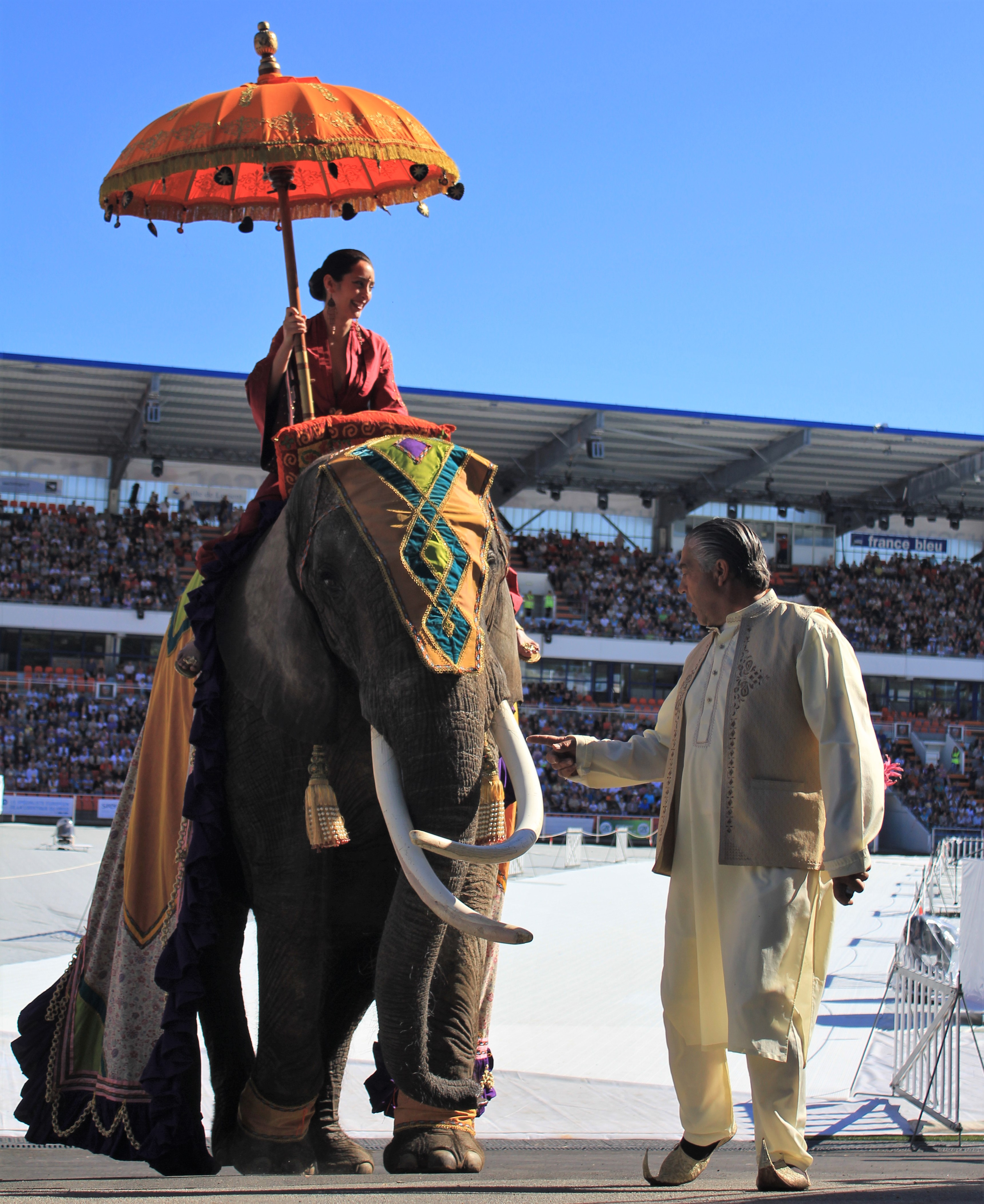 éléphant présent lors de la grande parade du festival interceltique de Lorient 2016